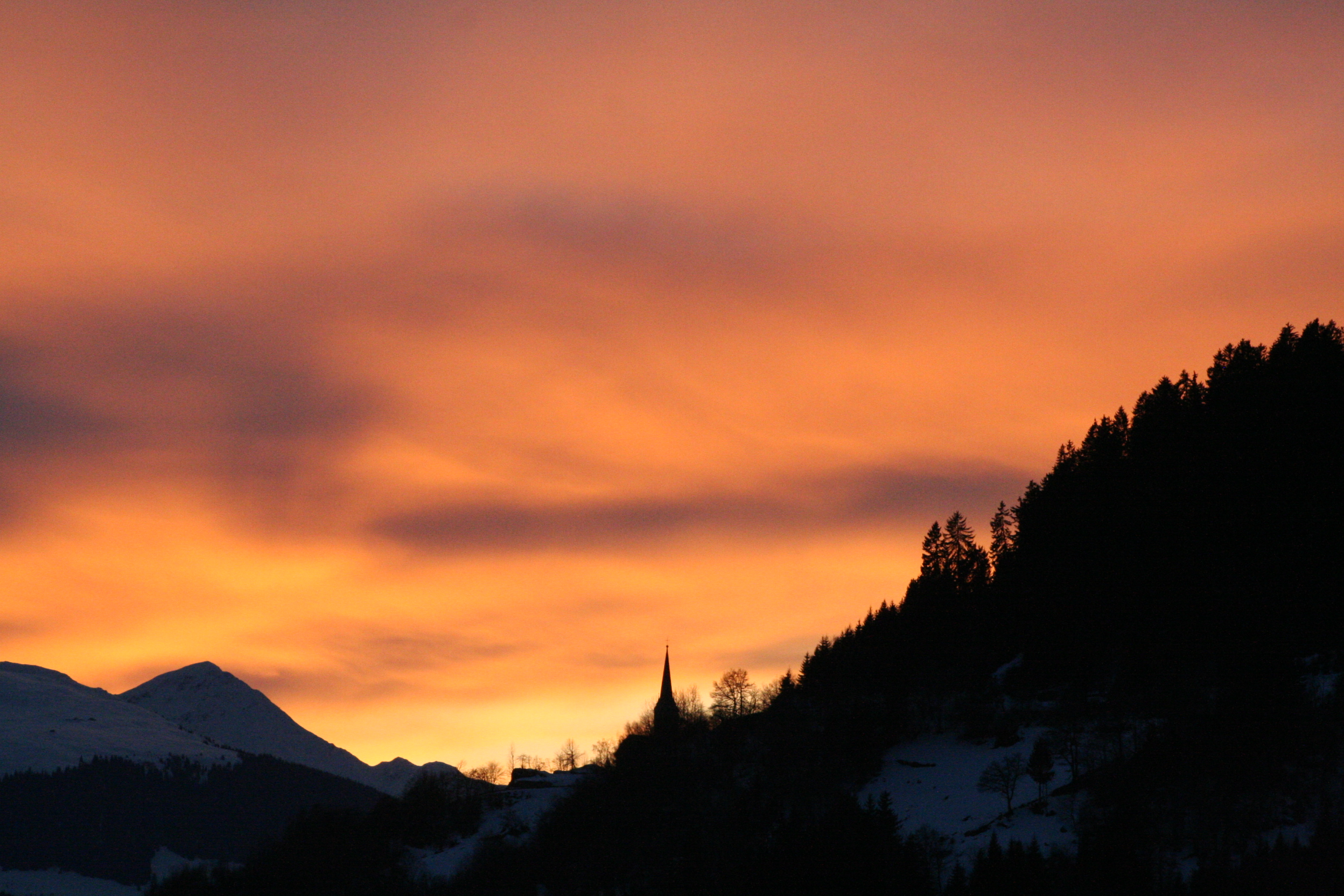 Kirche von Ladir im Sonnenuntergang